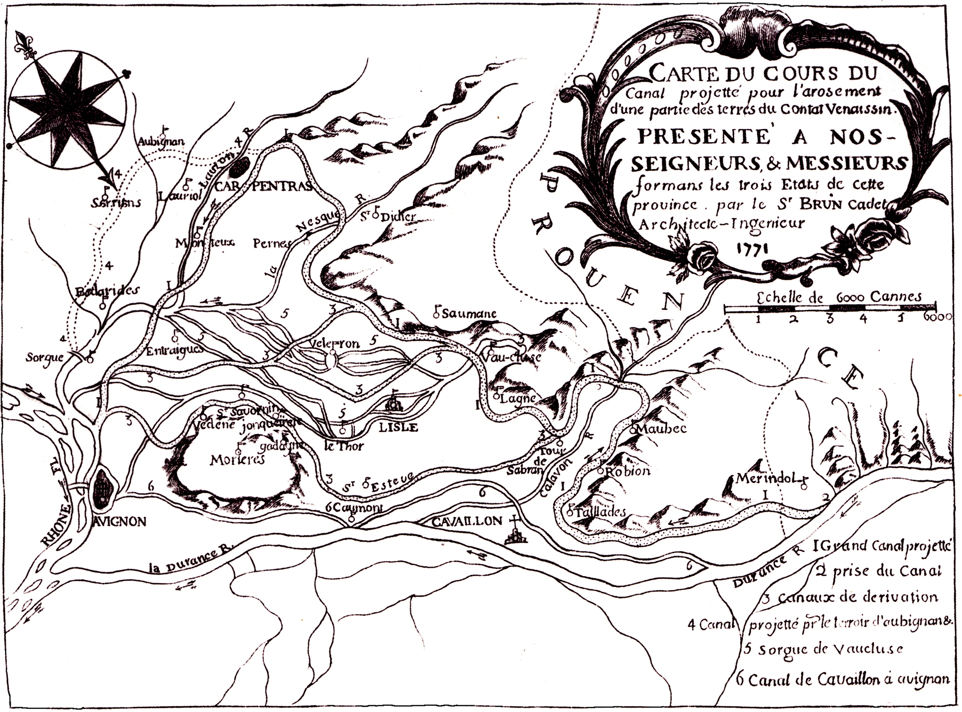 Schéma/carte d'irrigation du Comtat Venaissin